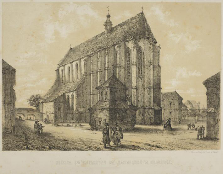 Kościół Śtej Katarzyny na Kazimierzu w Krakowie